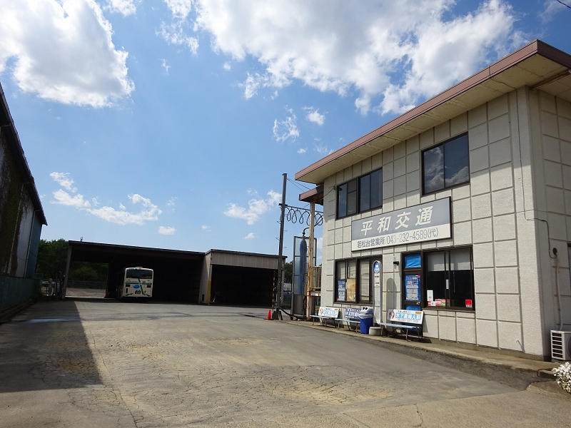 平和交通若松営業所